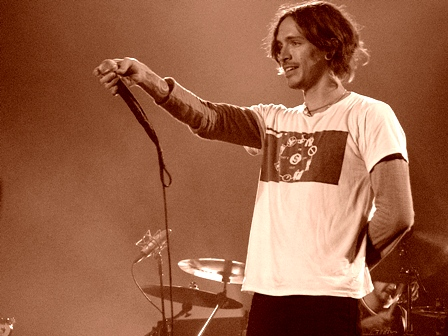 Brandon Boyd von Incubus live in San Sebastian